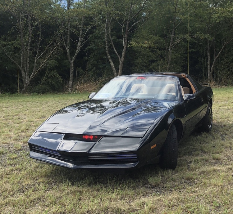 ポンティアックトランザム ナイト２０００仕様